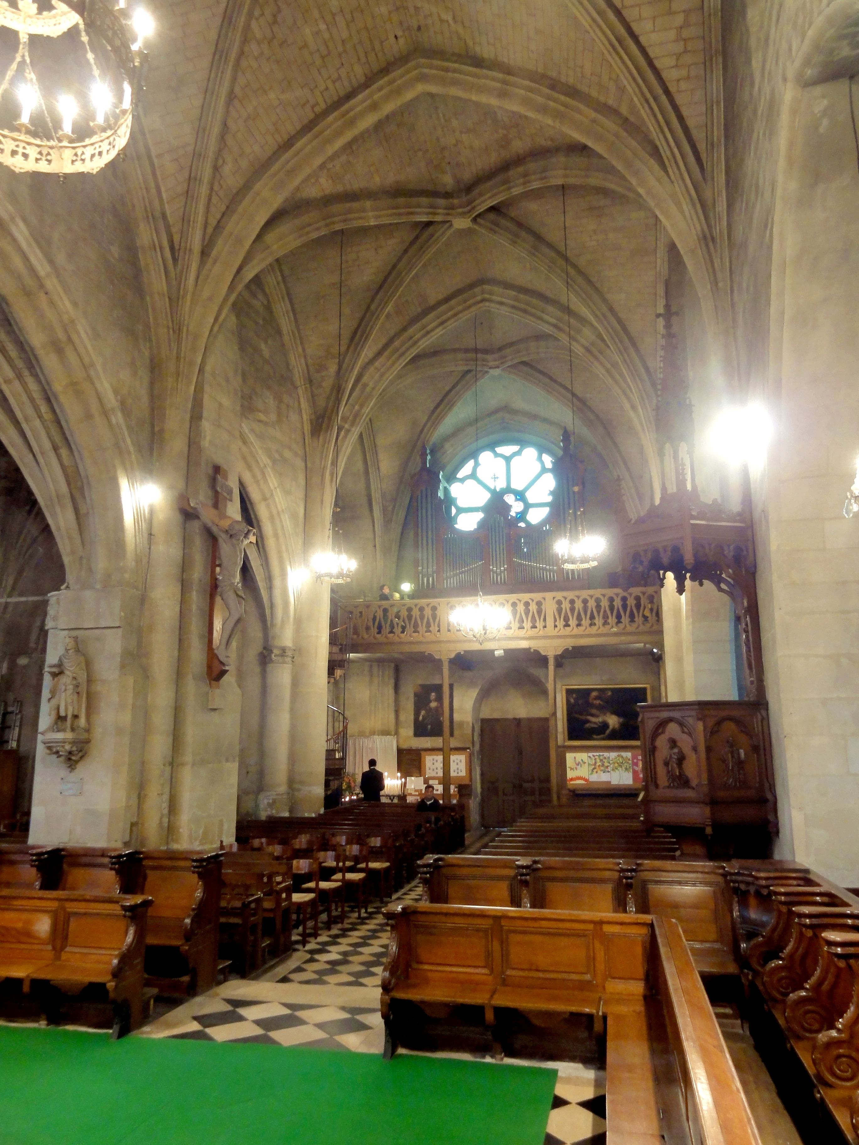 Vaisseau central, vue vers l'ouest.